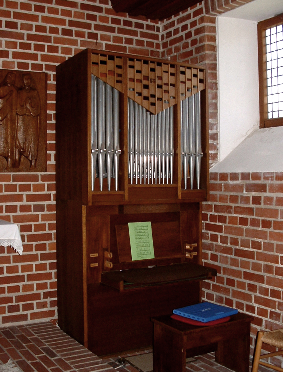 Evangelische Kirche Hochscheid im Hunsrück